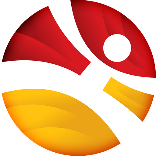 As cores da Federal e do CAASO representadas no logo da Taça Universitária de São Carlos